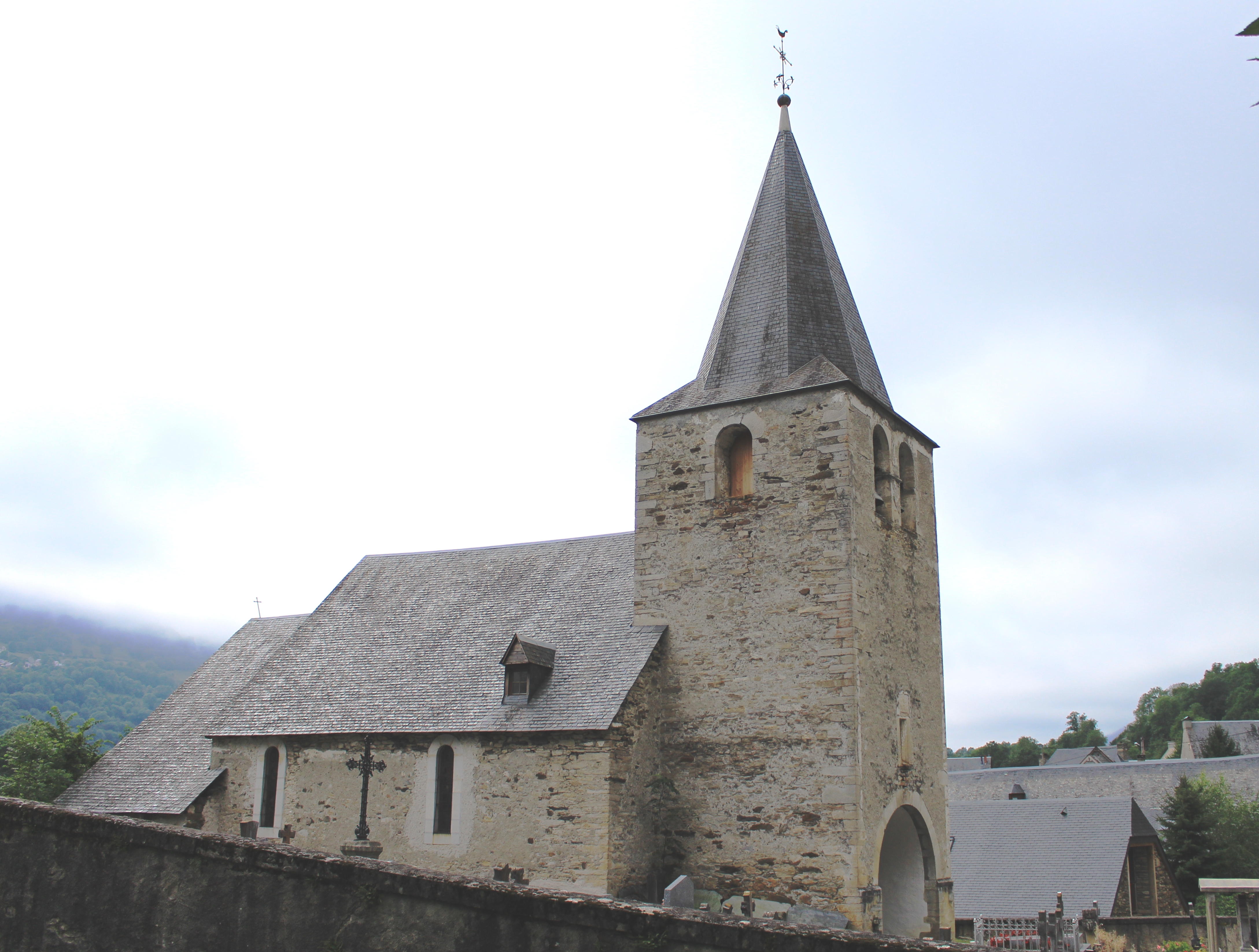 Église Saint-Étienne d'Adervielle (Hautes-Pyrénées)